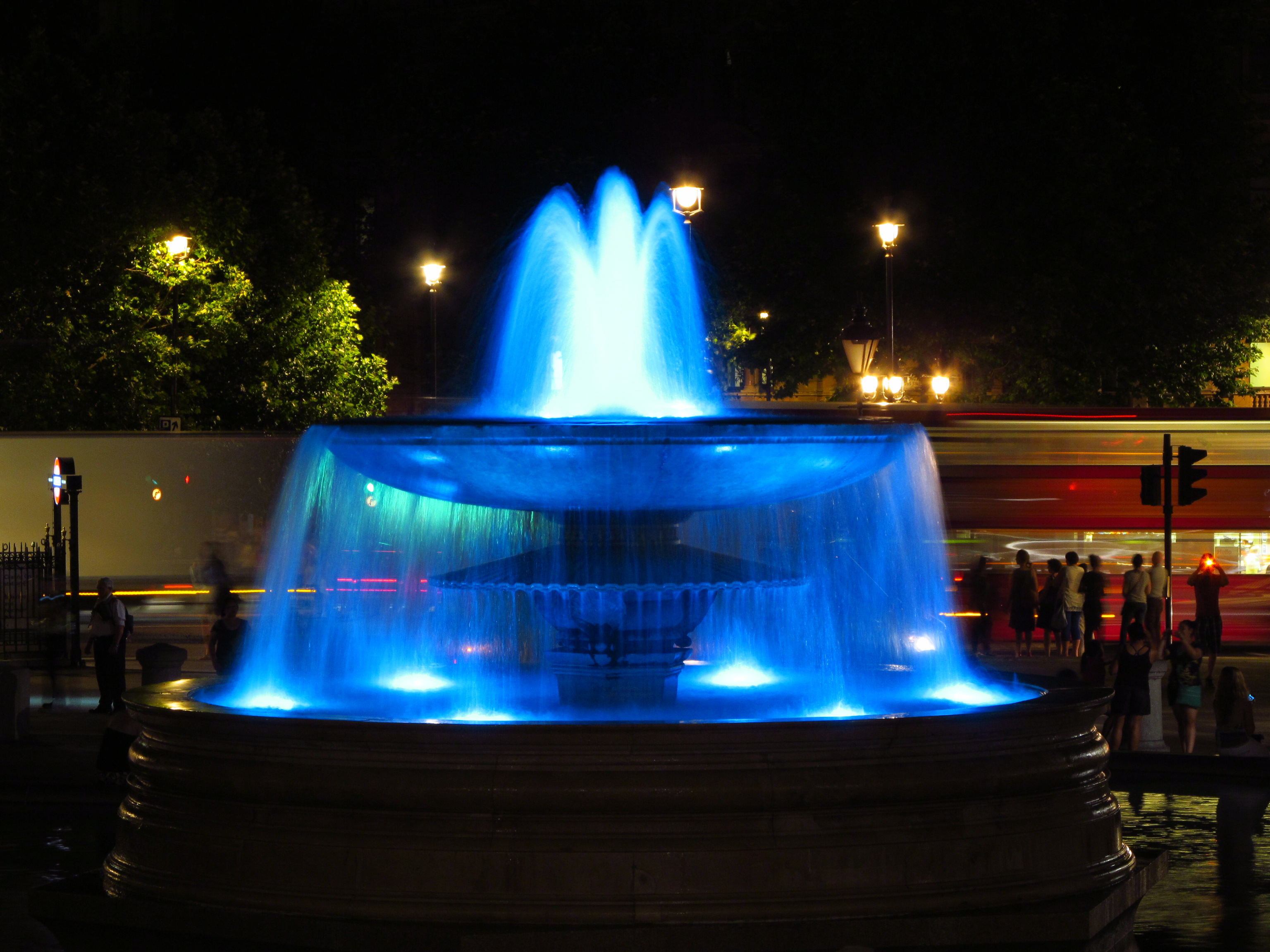 A King is born!